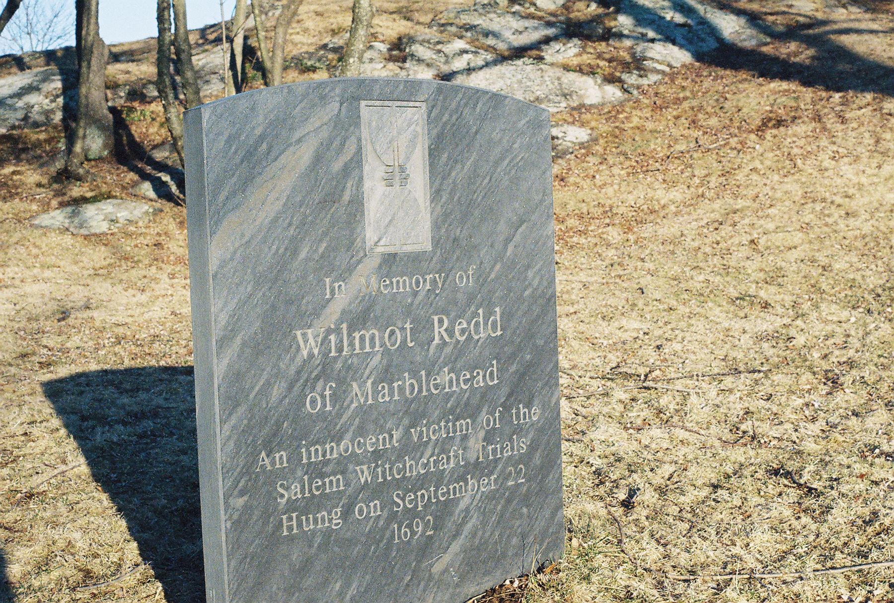 Le mémorial en hommage à Wilmot Redd, condamnée à mort au procès des sorcières de Salem.